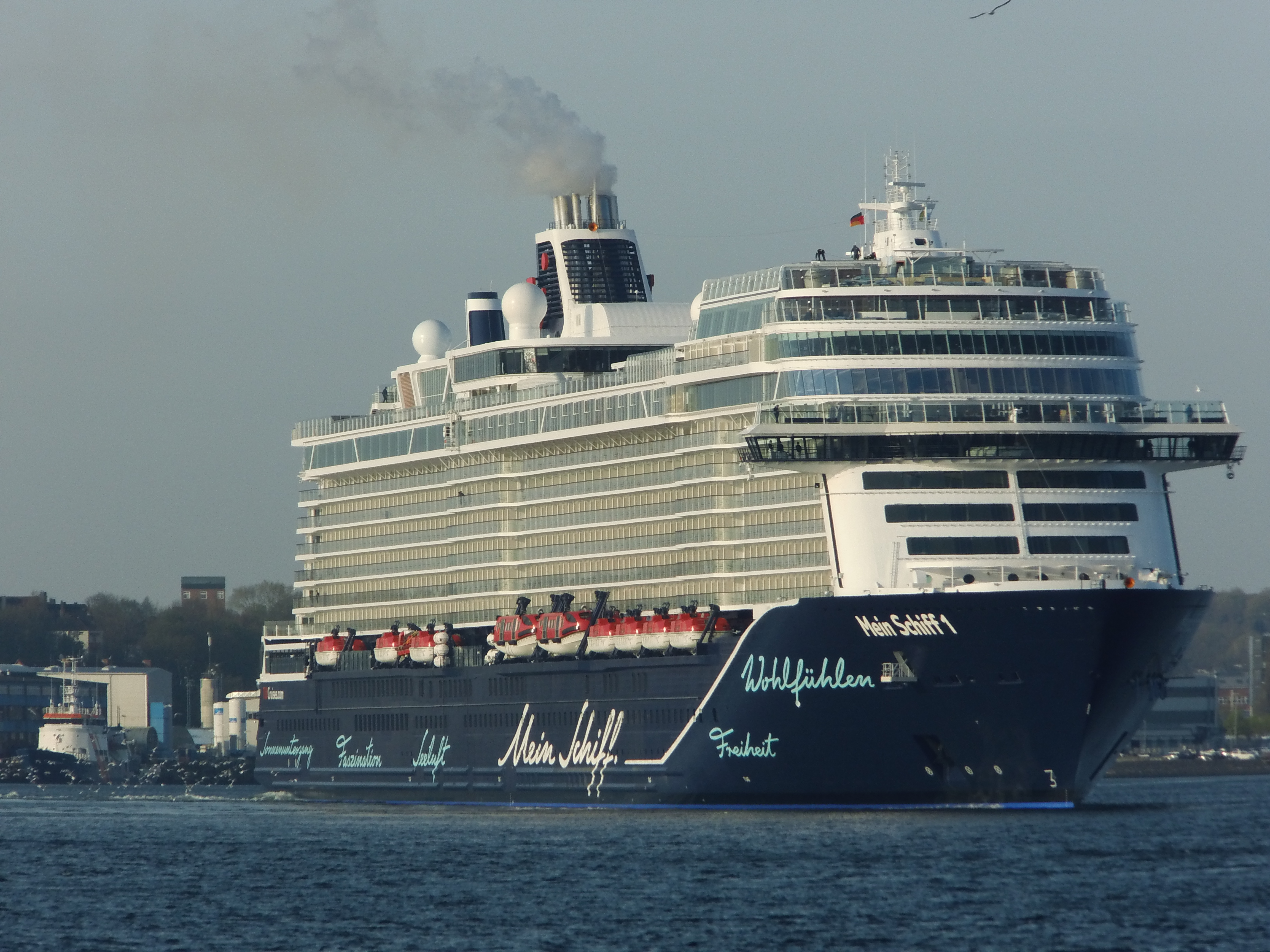 New Mein Schiff 1 in Kiel for the first time.